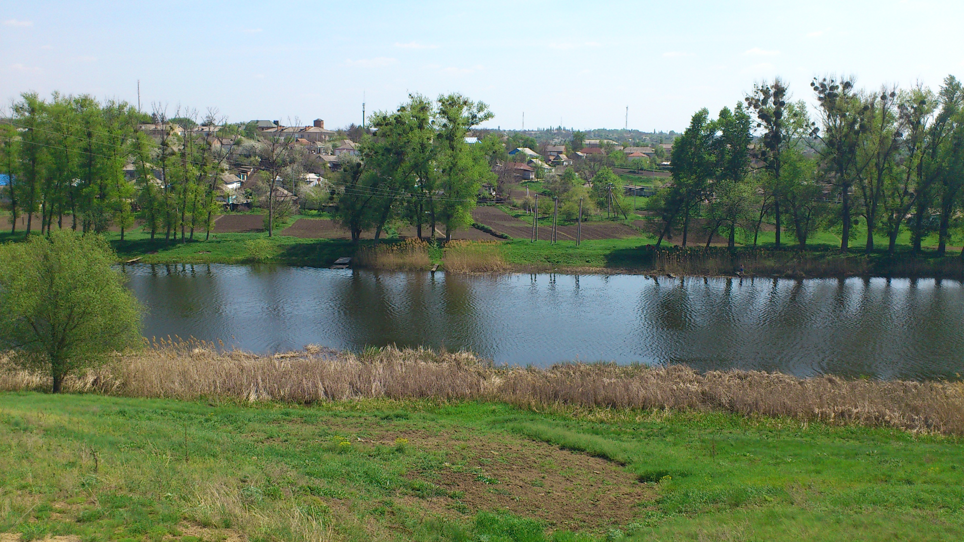 Розкопки міста золотоординського періоду біля с. Торговиця